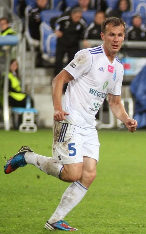 Marek Zieńczuk w barwach Ruchu Chorzów